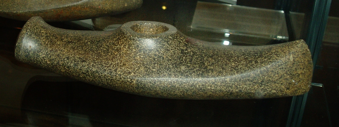 Suomen kansallismuseon kokoelmiin kuuluva vasarakirves.